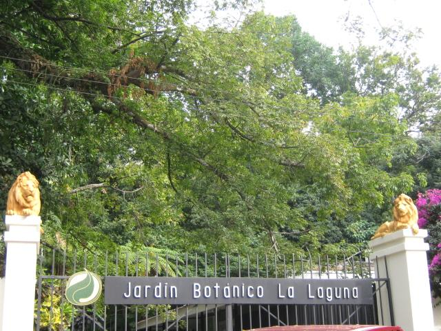 Portada del Jardín.